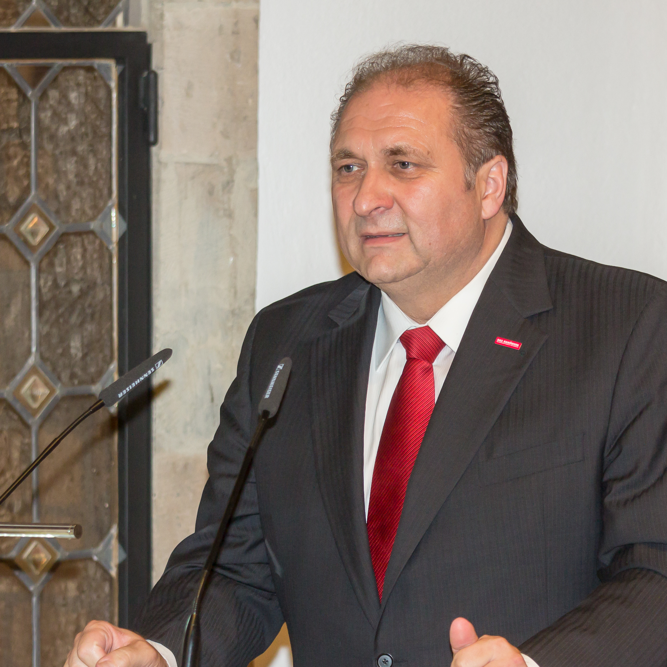 Verleihung des Europäischen Handwerkspreises an Karl Kardinal Lehmann Foto: Hans Peter Wollseifer, Präsident des Zentralverbands des Deutschen Handwerks und der Handwerkskammer zu Köln